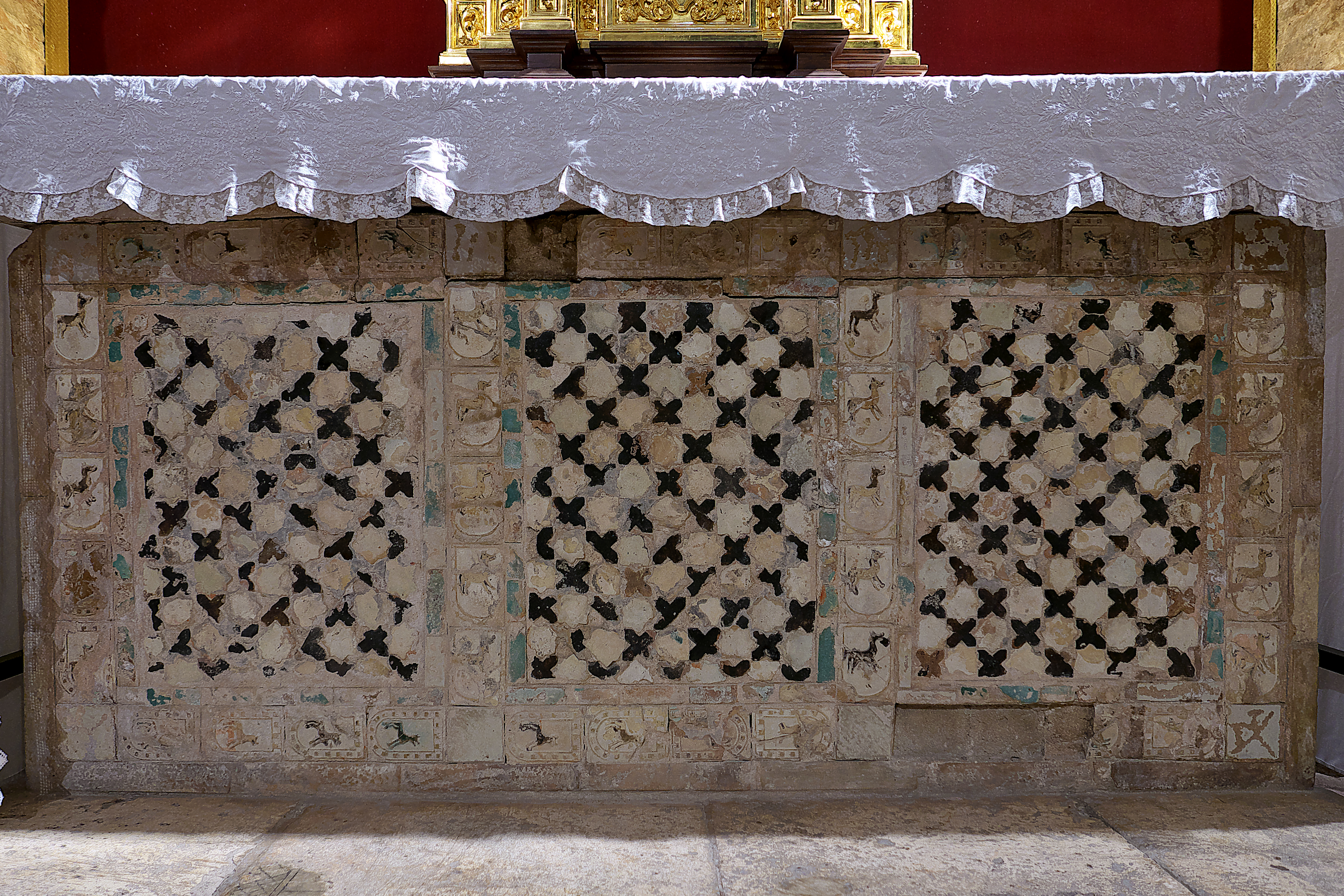 Capilla del Sagrario de la Iglesia de Santa Marina y San Juan Bautista de La Salle, Sevilla. Frontal de altar, utilizando una lauda sepulcral procedente de una triple tumba situada en esta misma capilla funeraria. Paños de azulejos vidriados mudéjares, con verdes, blancos y manganeso; cenefas y piezas en relieves heráldicas. Datados en el último tercio del siglo XIII, es la cerámica vidriada más antigua que se conserva en la ciudad de Sevilla.